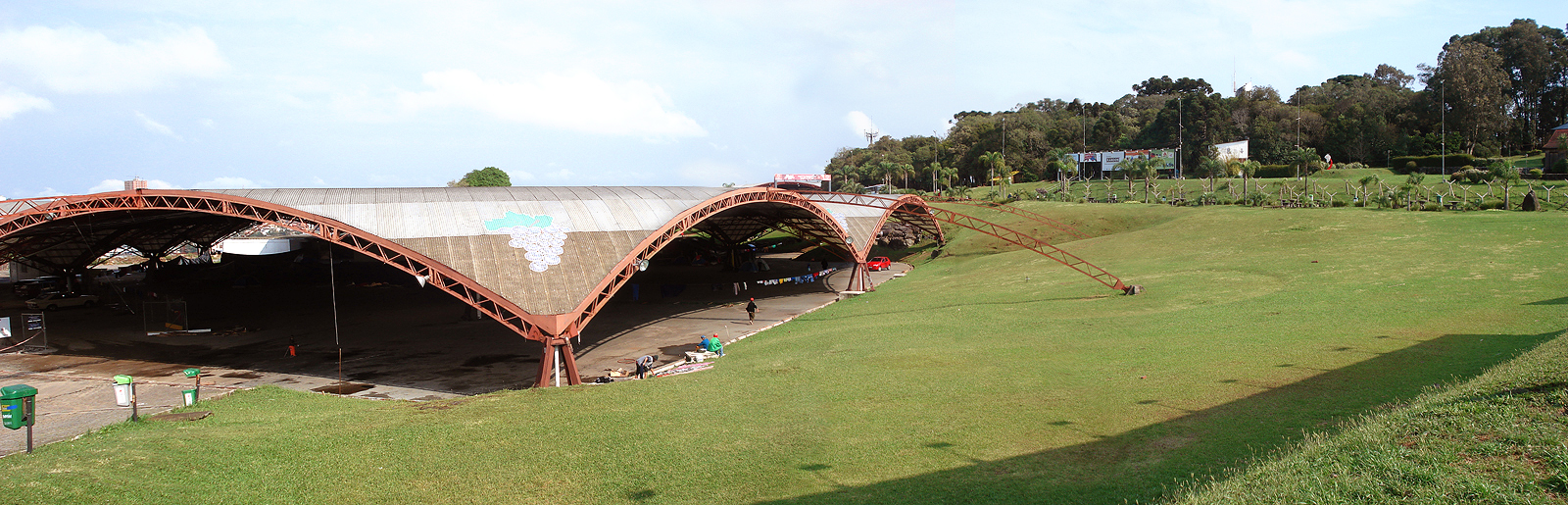 Pavilhões da Festa da Uva, no Parque Centenário, em Caxias do Sul, Brasil